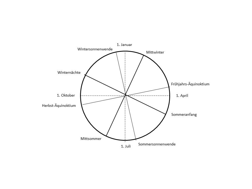 Einteilung des Jahres in Quartale im vorchristlichen Island